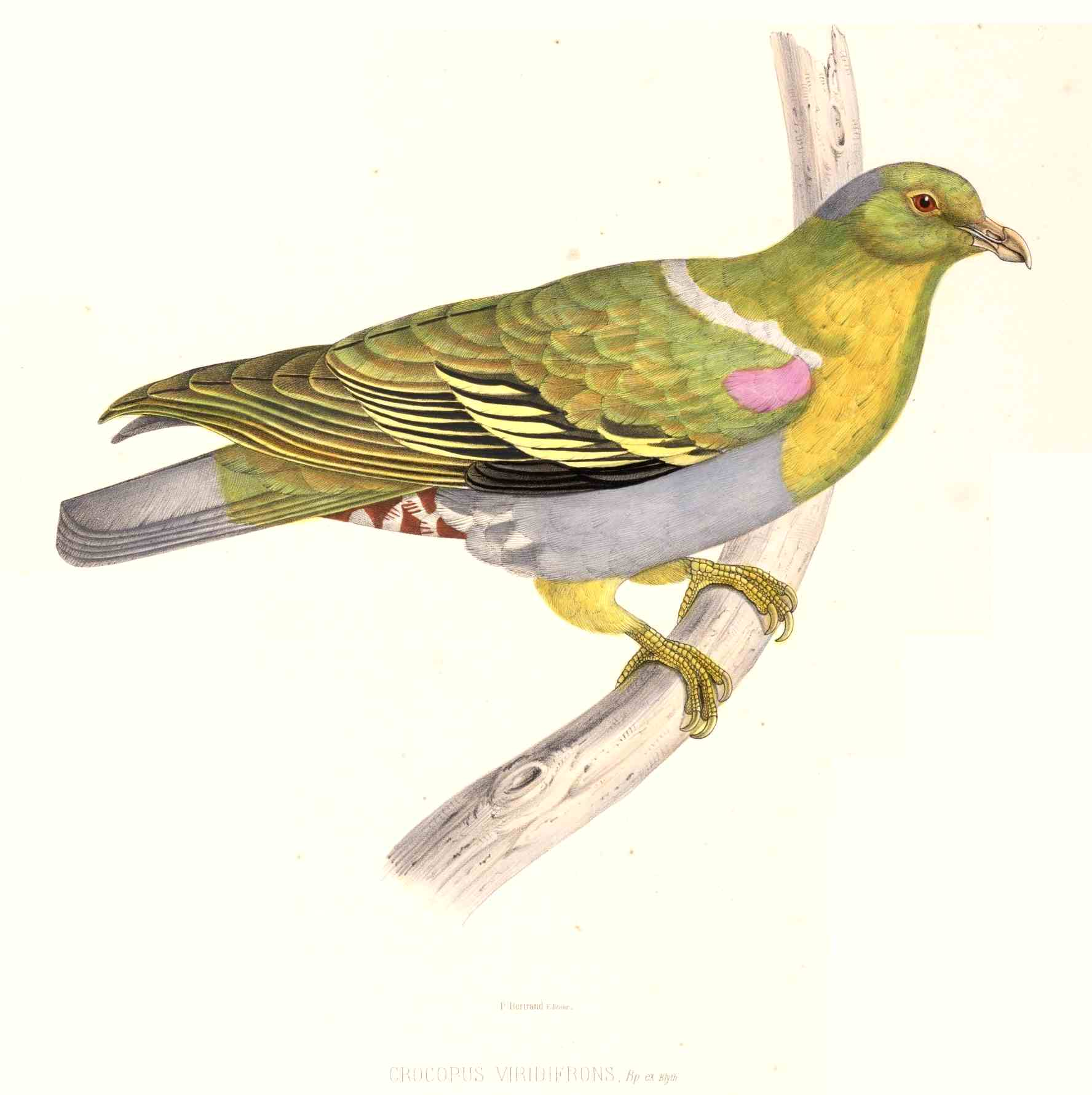 Crocopus viridifrons (=Treron phoenicopterus viridifrons)